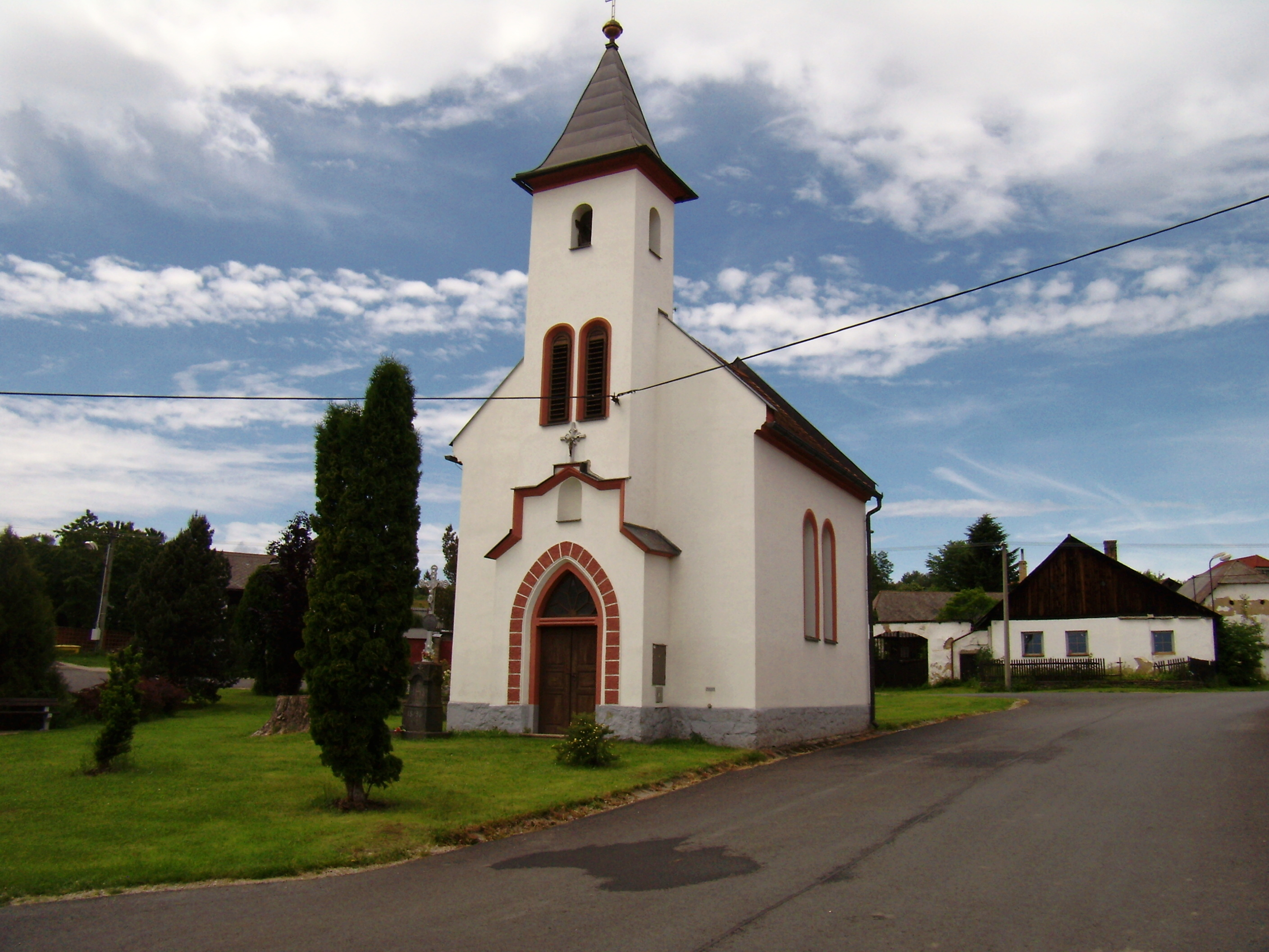 Buk - kaple Panny Marie Sedmibolestné